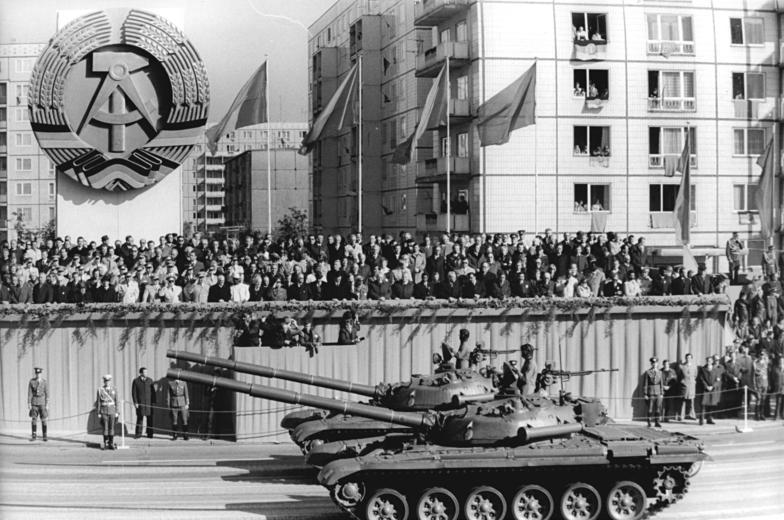 Berlin, 30. Jahrestag DDR-Gründung, Parade ADN-ZB Kluge 7.10.79 Berlin: Ehrenparade Eine Ehrenparade der NVA zum 30. Jahrestag der DDR war am 7.10.79 in Berlin beeindruckender Auftakt des Jubiläumstages. Eine Formation moderner Panzer, eine Weiterentwicklung der bewährten T-Serie, paradierte in der Karl-Marx-Allee. [Berlin, Karl-Marx-Allee.- Parade, Panzer T-72 vor Ehrentribüne mit DDR-Symbol]